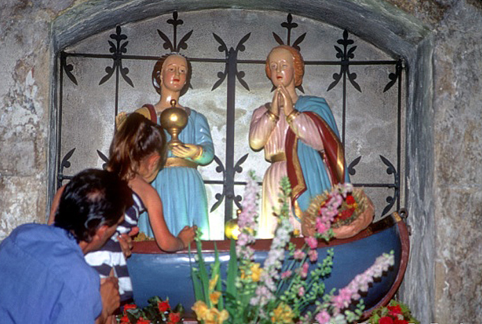 Baiser d'une fillette à la barque des Saintes Maries Jacobé & Salomé dans l'église des Saintes-Marie-de-la-Mer